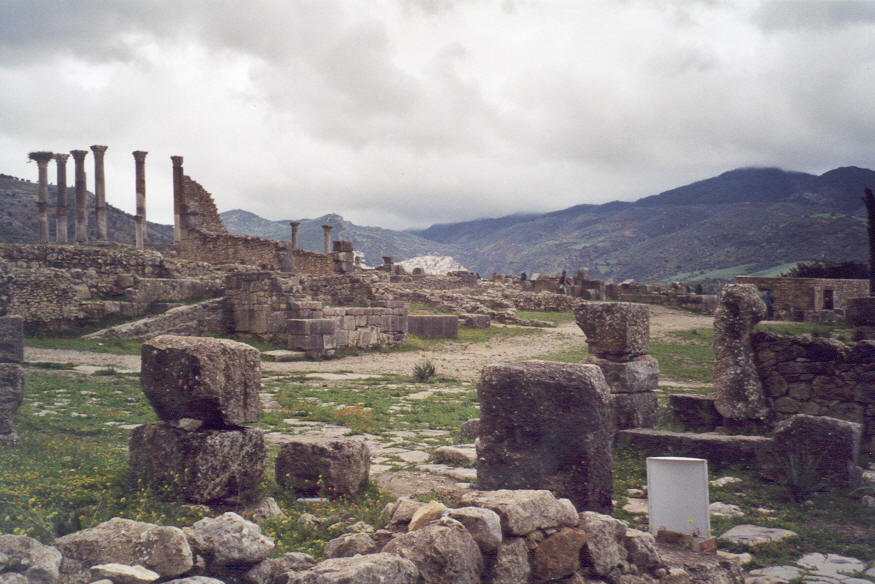 Les ruines de Volubilis avec au fond à flanc de colline (la tache blanche) le village de Moulay Idris où se trouve le tombeau d'Idris Ier Photo prise au printemps 2002 M. Benoist